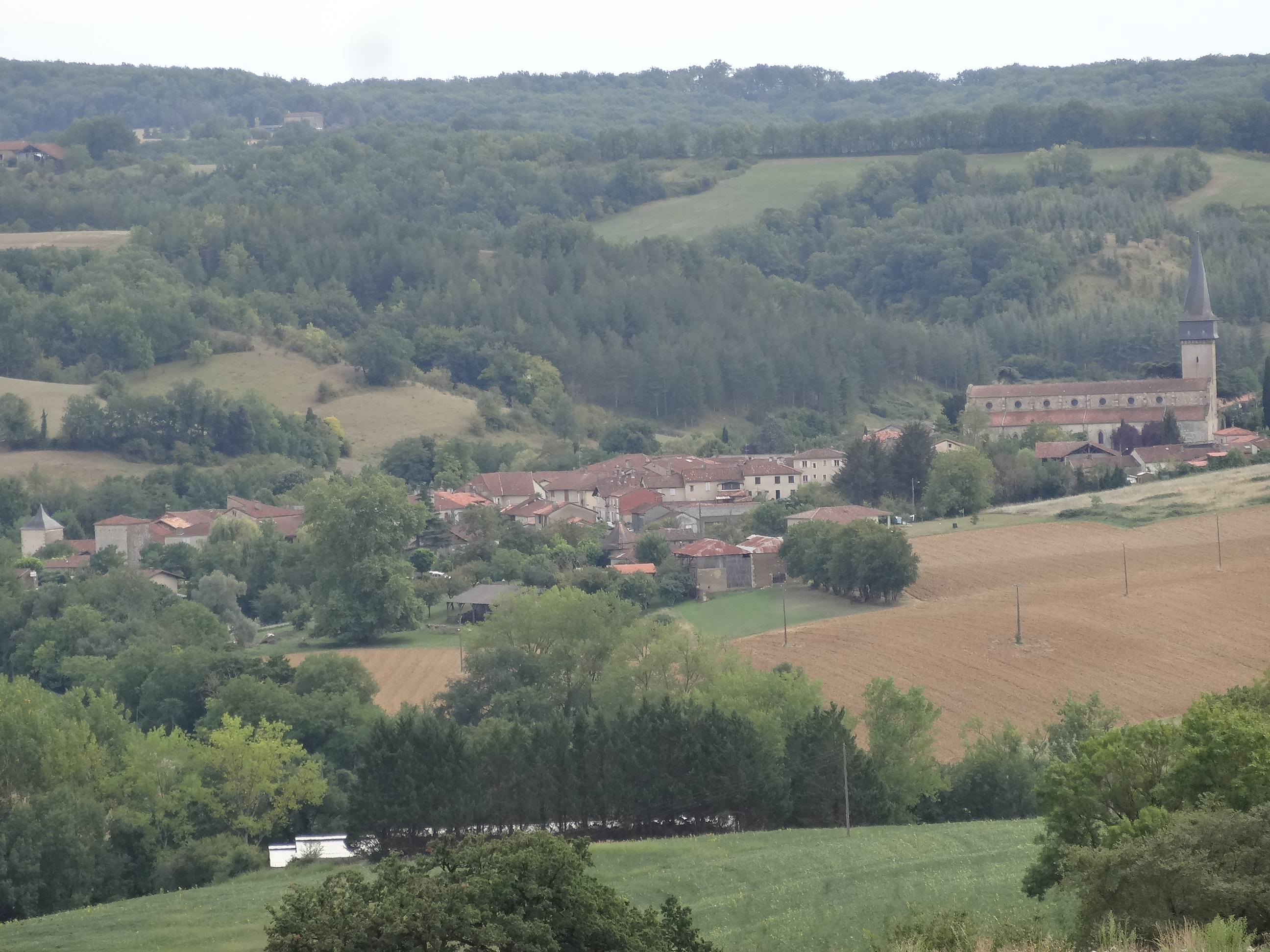 Vue de Barran (Gers, France).